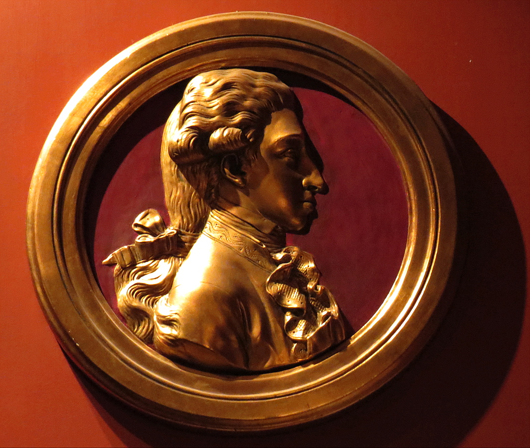 Christian VII af Danmark og Norge, profilrelief af Nicolai Dajon (1748–1823), Hofteatret, Christiansborg, København